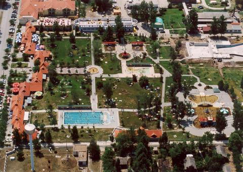 Cserkeszőlő, Hungary, aerial photography